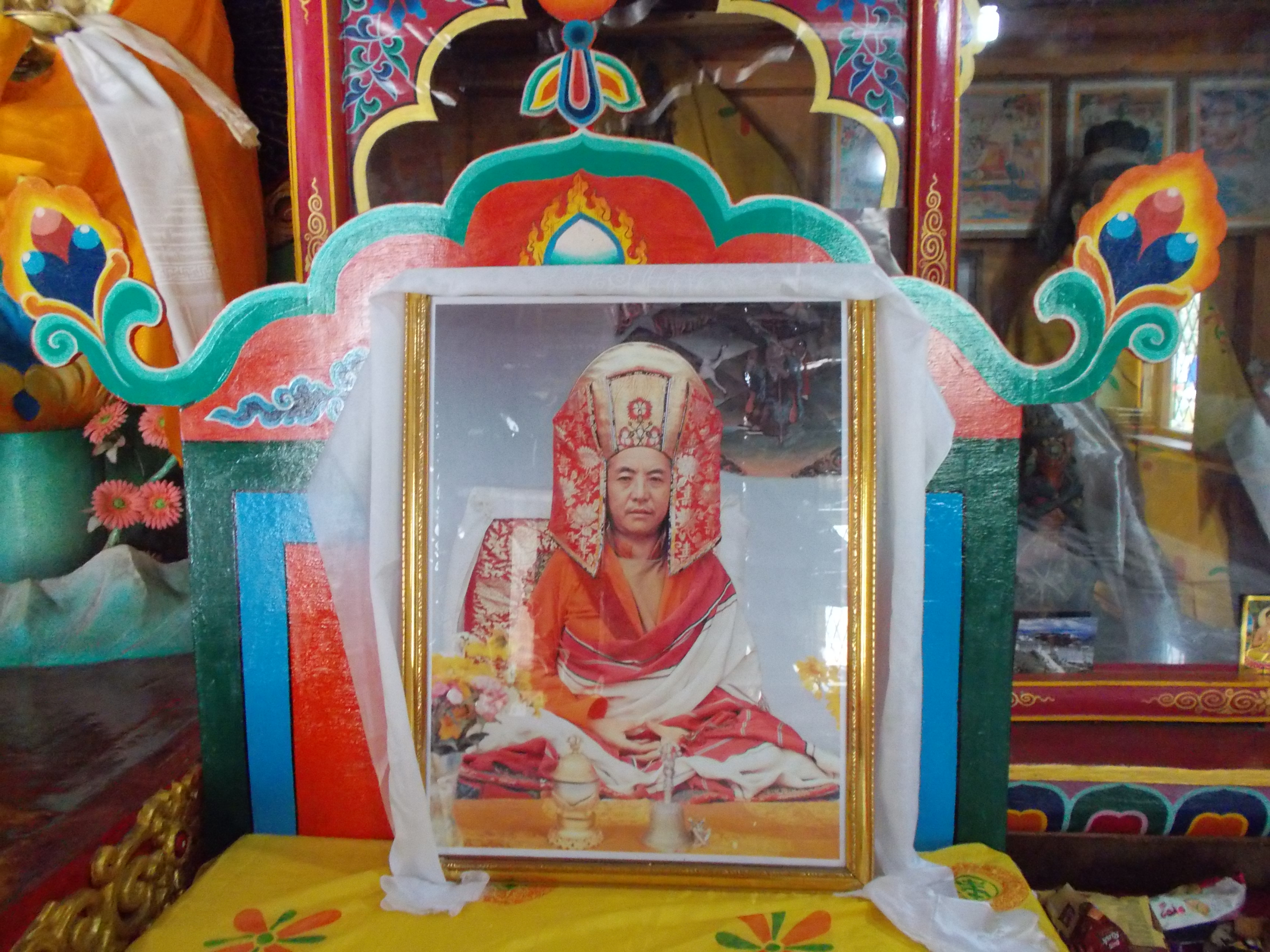 Апо Еше Рангдрол Ринпоче - фото у трона в монастыре Карданг, традиция Шакья Шри